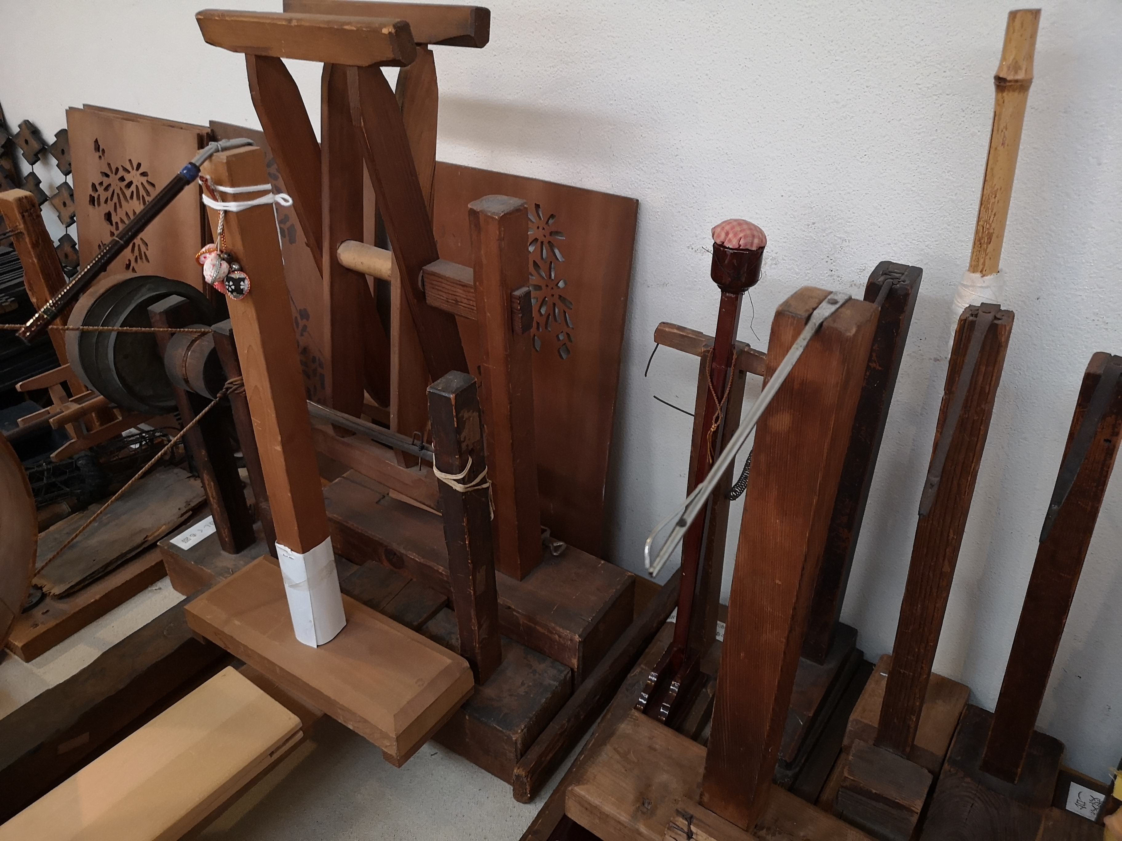 有松絞りの道具。絞りの道具は、絞り模様ごとに異なる。